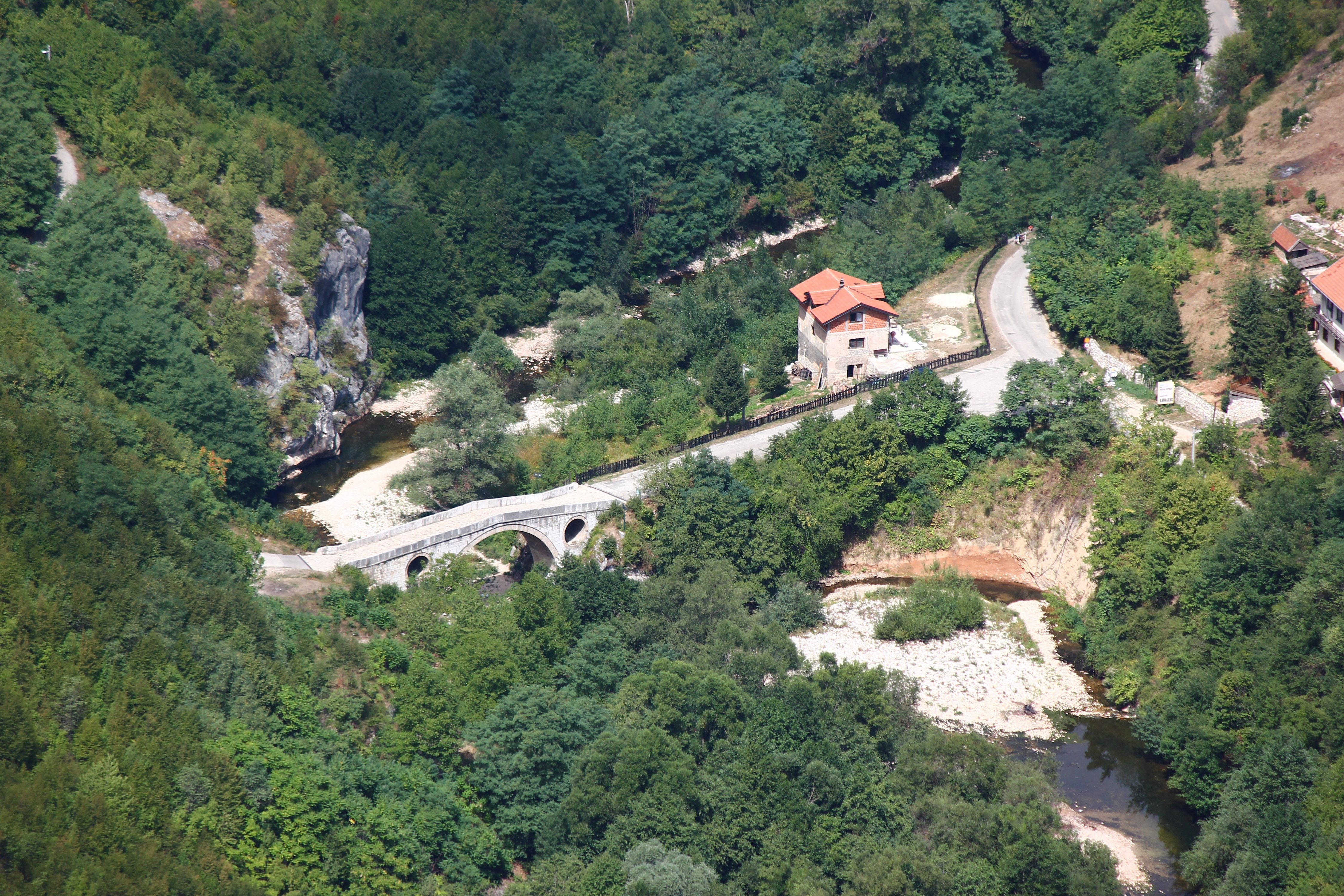 Die Ziegenbrücke über die Miljacka bei Sarajevo von oben gesehen.